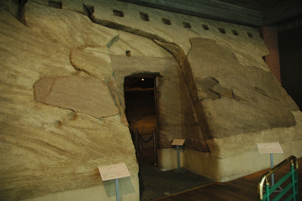 Tempel von Ellesija, ursprünglich von Thutmosis III. in Unternubien bei Qasr Ibrim errichtet, heute im Museo Egizio in Turin